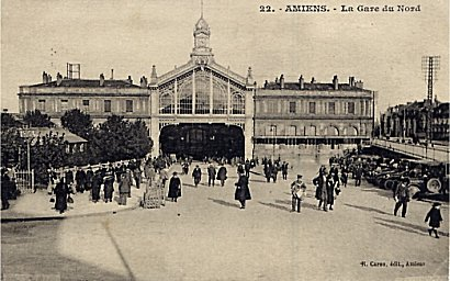 Gare du Nord, Amiens.